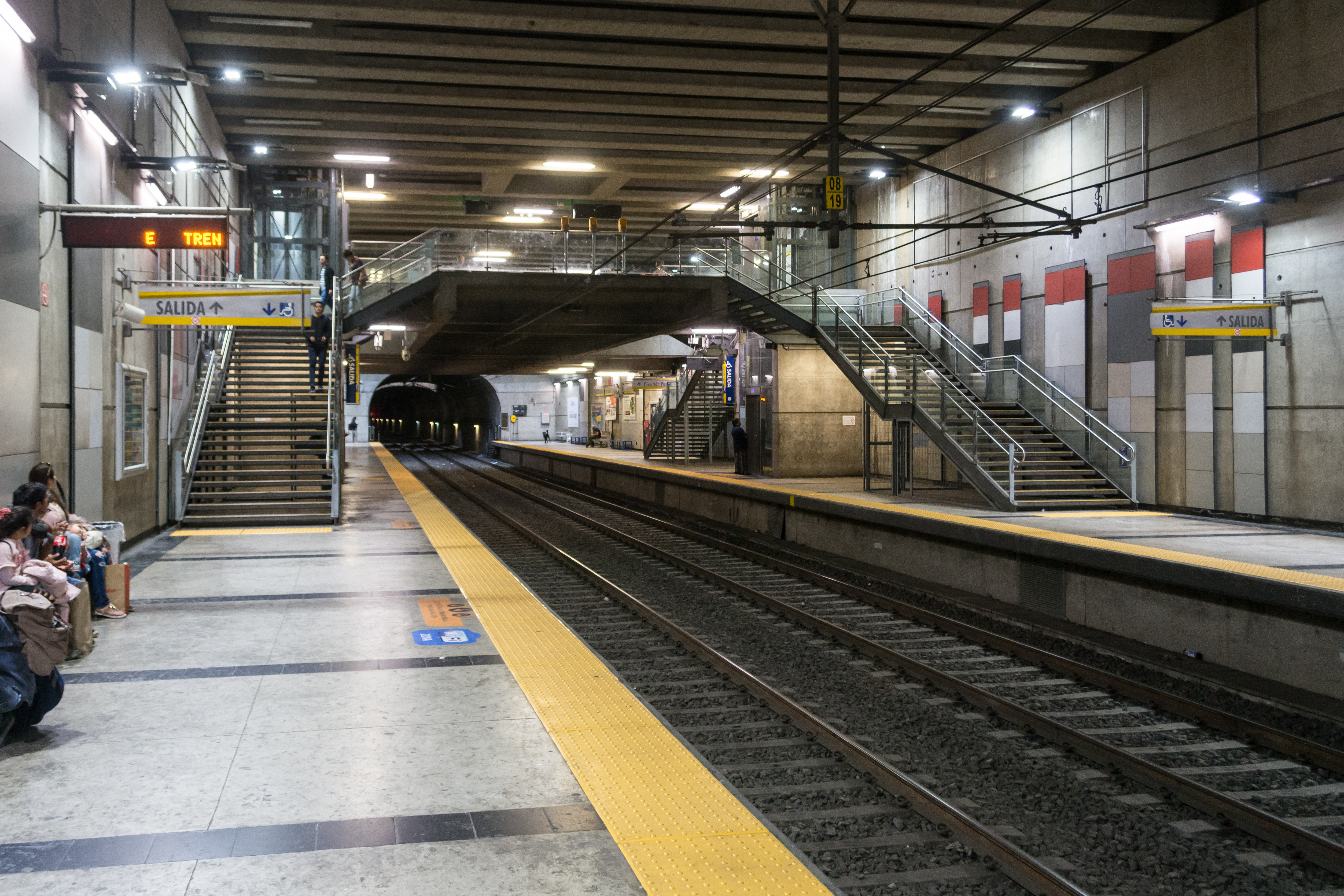 Estación Viña del Mar, Región de Valparaíso, Chile